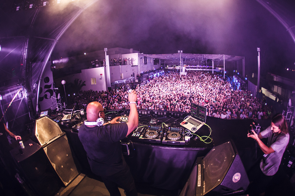 Space Ibiza Closing Party